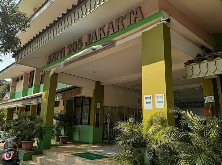 Ini foto saya sendiri, saya warga sekolah